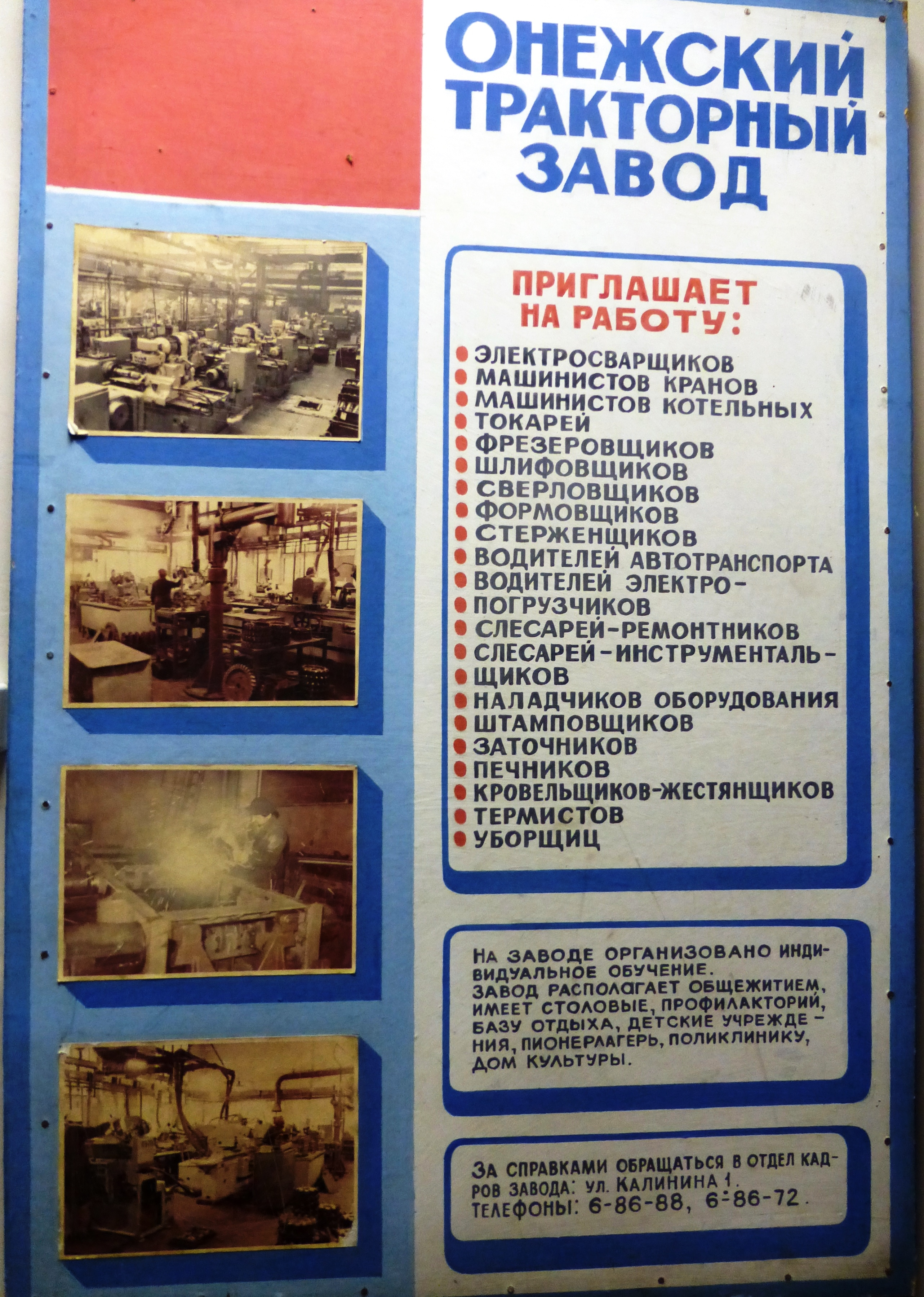 Стенд Онежского тракторного завода 1970-1980 гг. (музей промышленной истории в Петрозаводске).